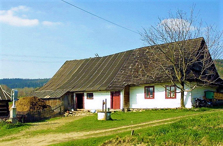 Łemkowska chyża we wsi Nowica powiat gorlicki